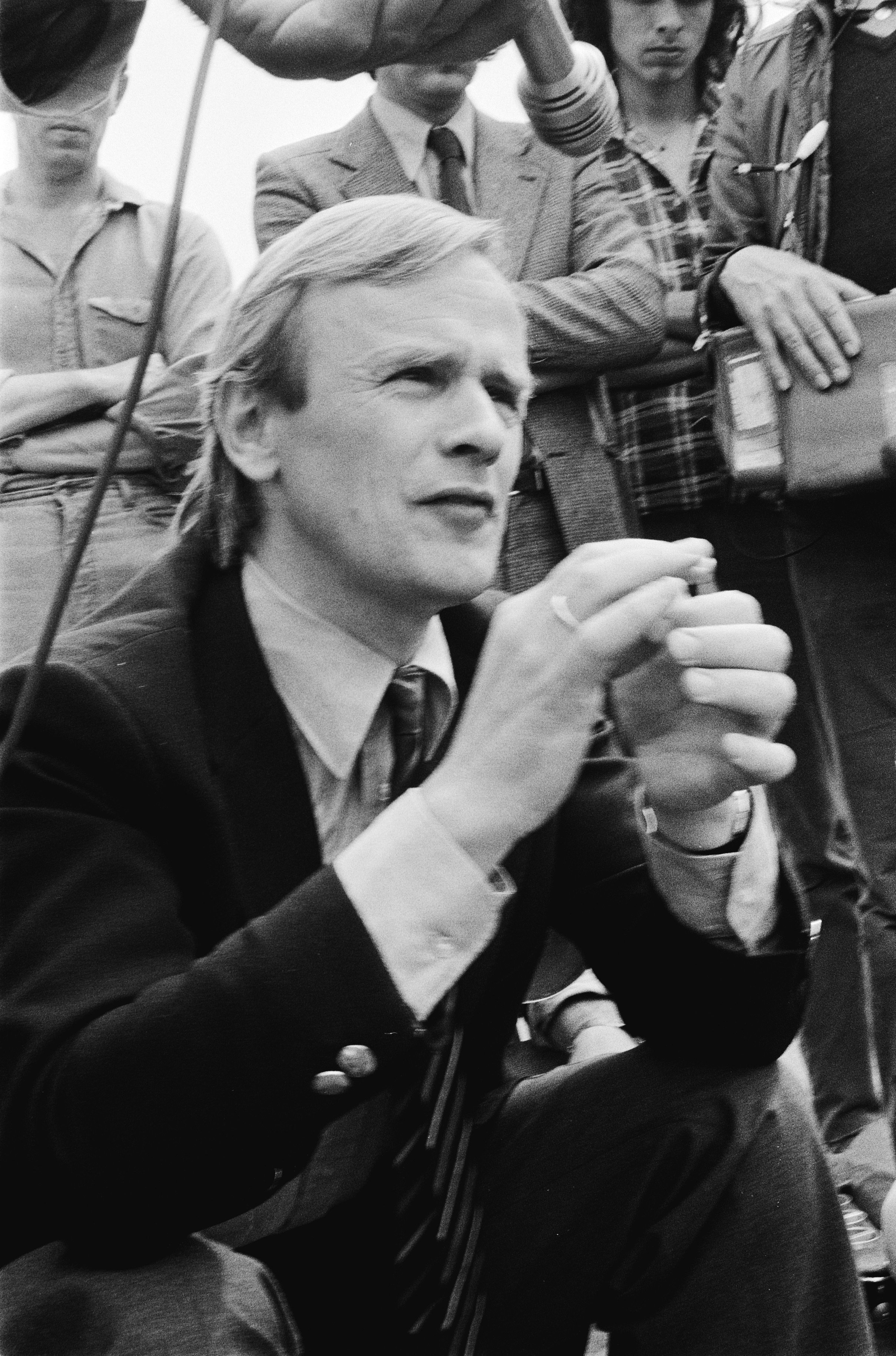 Collectie / Archief : Fotocollectie Anefo Reportage / Serie : Blokkade kerncentrale Dodewaard door leden aktiegroep Breek Atoomketen Nederland en de ontruiming door de ME Beschrijving : Burgemeester J. Patijn Datum : 27 mei 1980 Locatie : Dodewaard, Gelderland Trefwoorden : blokkades, burgemeesters, kerncentrales Persoonsnaam : Patijn, Jack Fotograaf : Pereira, Fernando / Anefo Auteursrechthebbende : Nationaal Archief Materiaalsoort : Negatief (zwart/wit) Nummer archiefinventaris : bekijk toegang 2.24.01.05 Bestanddeelnummer : 930-8448